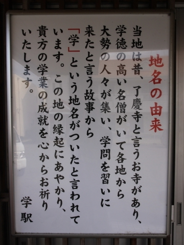 德島線學站車站名由來